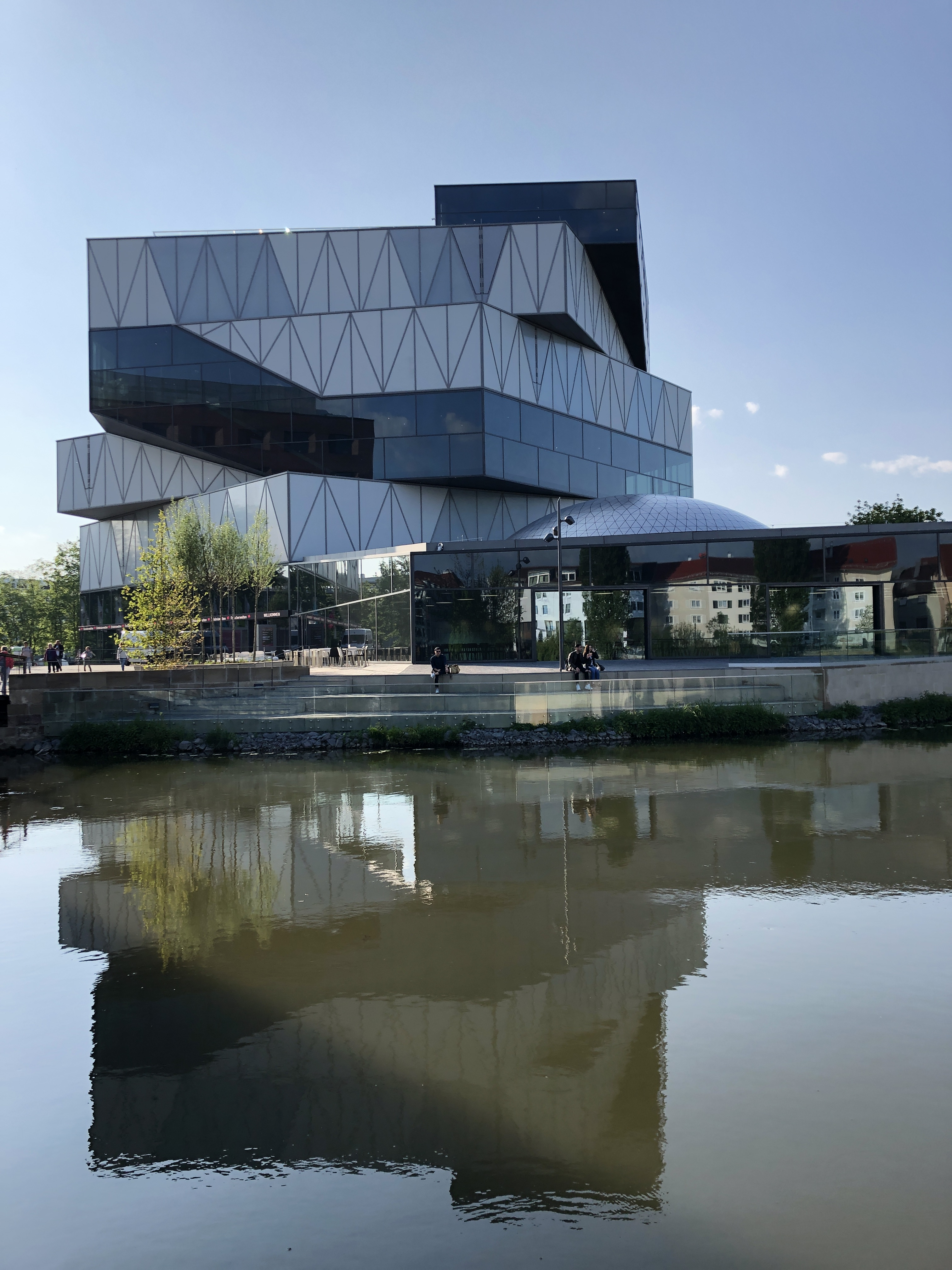 Die Architektur des Neubaus stammt vom Büro Sauerbruch Hutton.